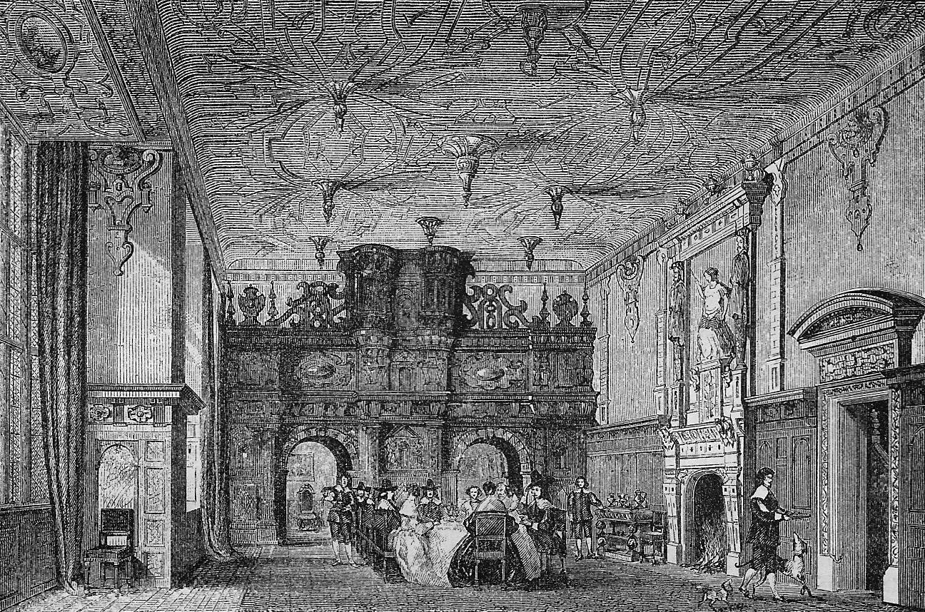 Dining room, Crewe Hall.